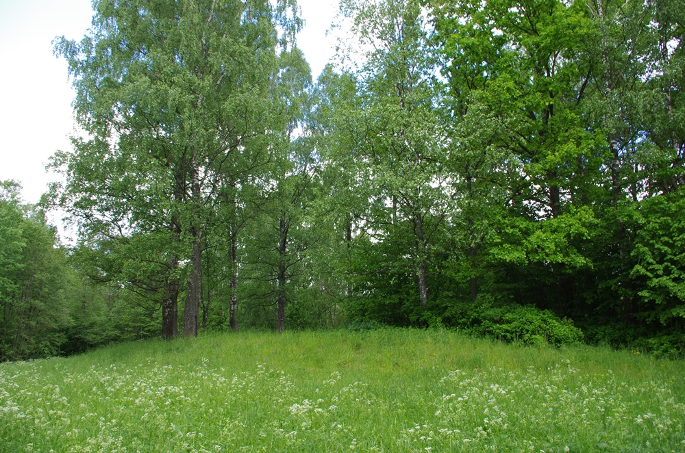 Likalaukių piliakalnis